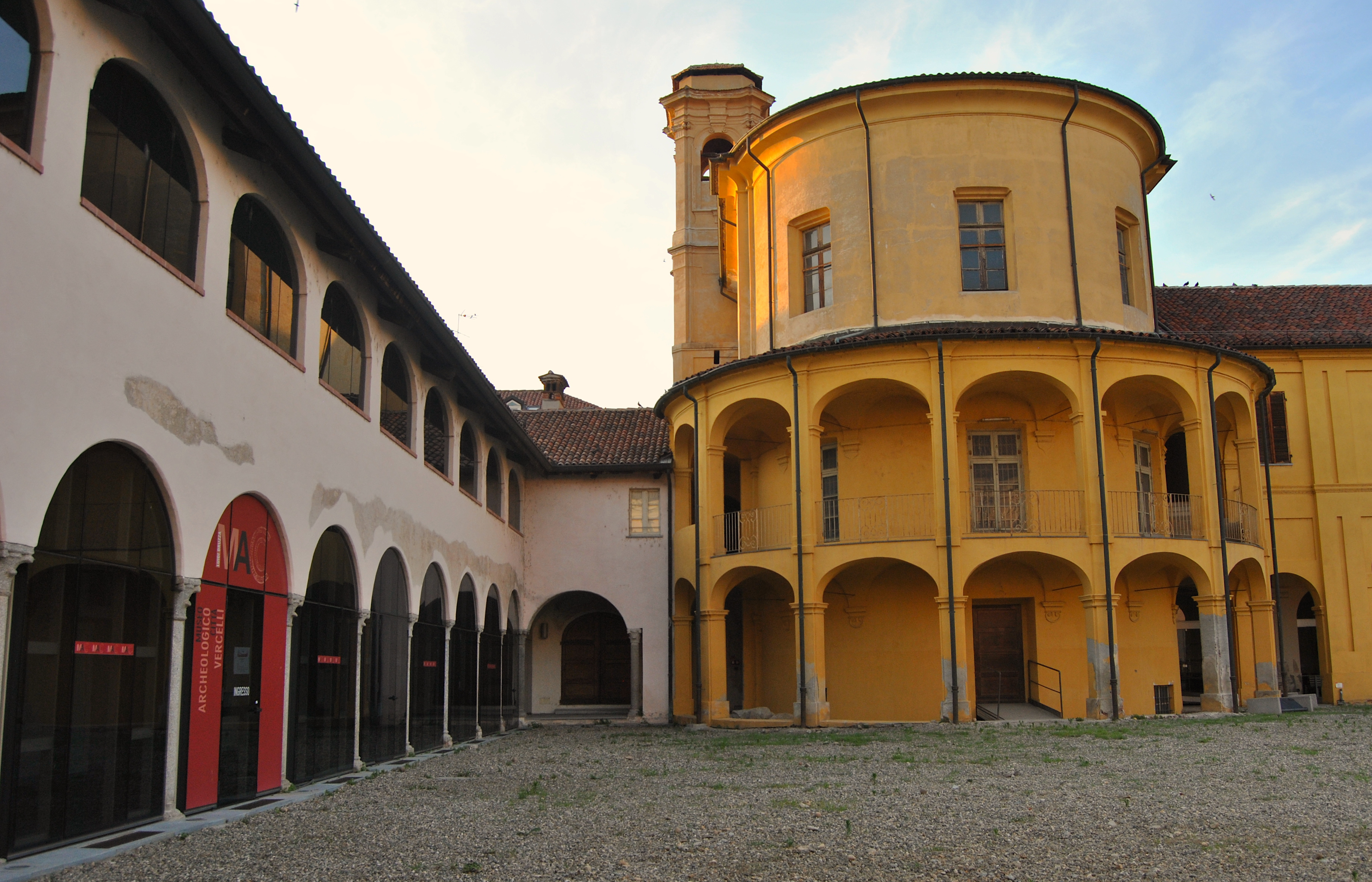 Chiostro ed abside del complesso di Santa Chiara in Vercelli